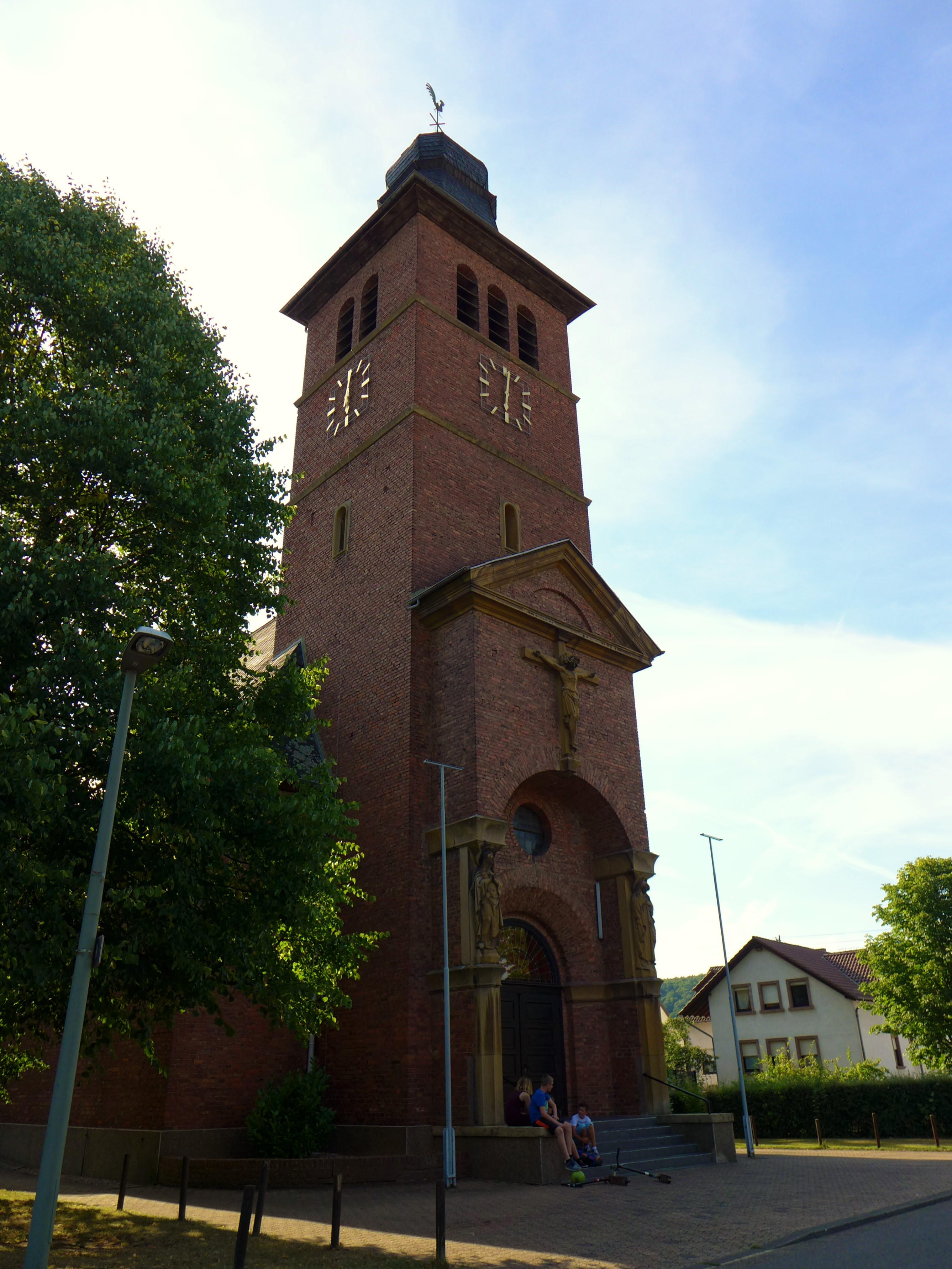 St. Michael (Körprich), Turmfassade von Südosten